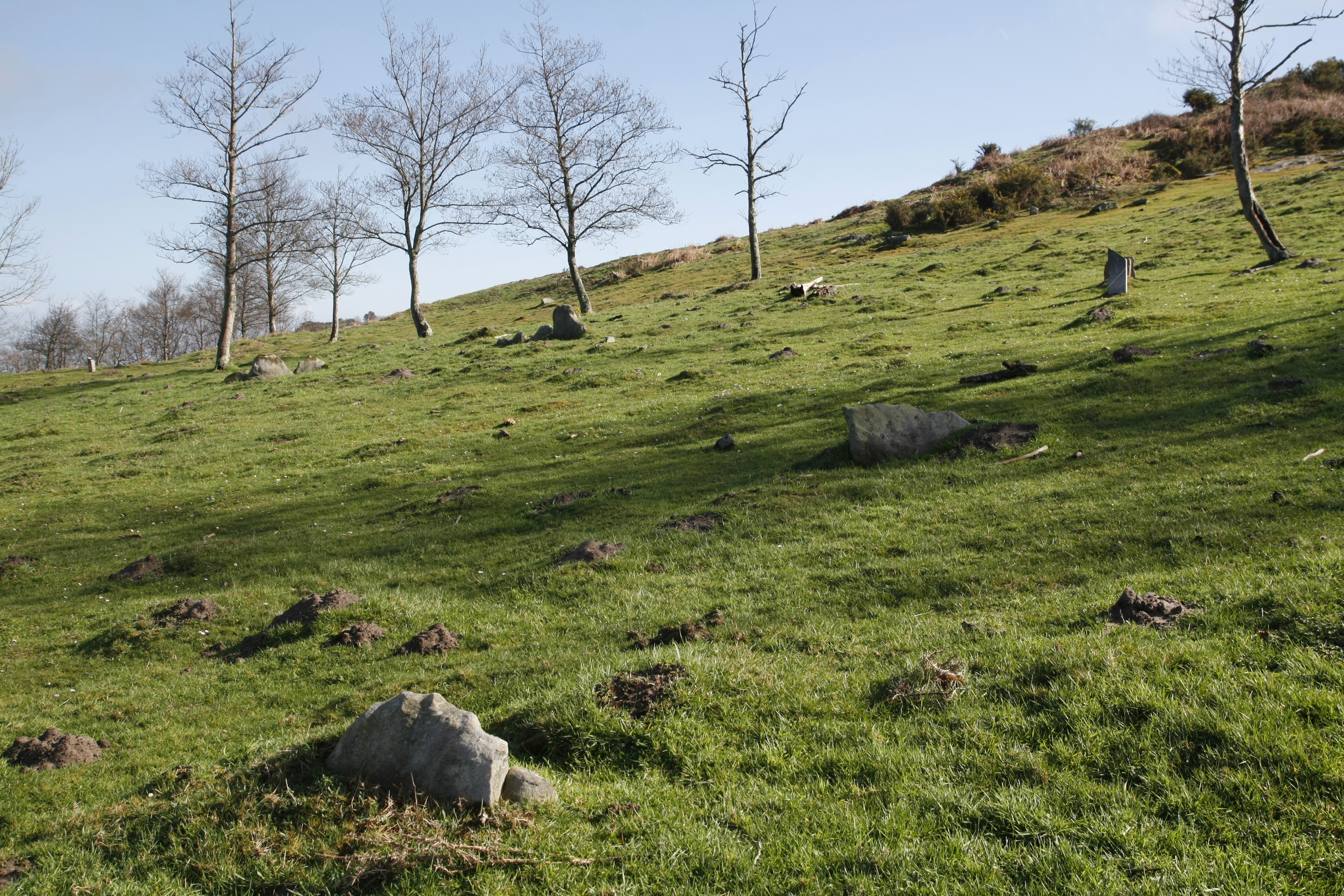 Jaizkibel II harrespilak 1-5 - Hondarribia